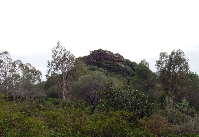 Complesso nuragico di Meurra